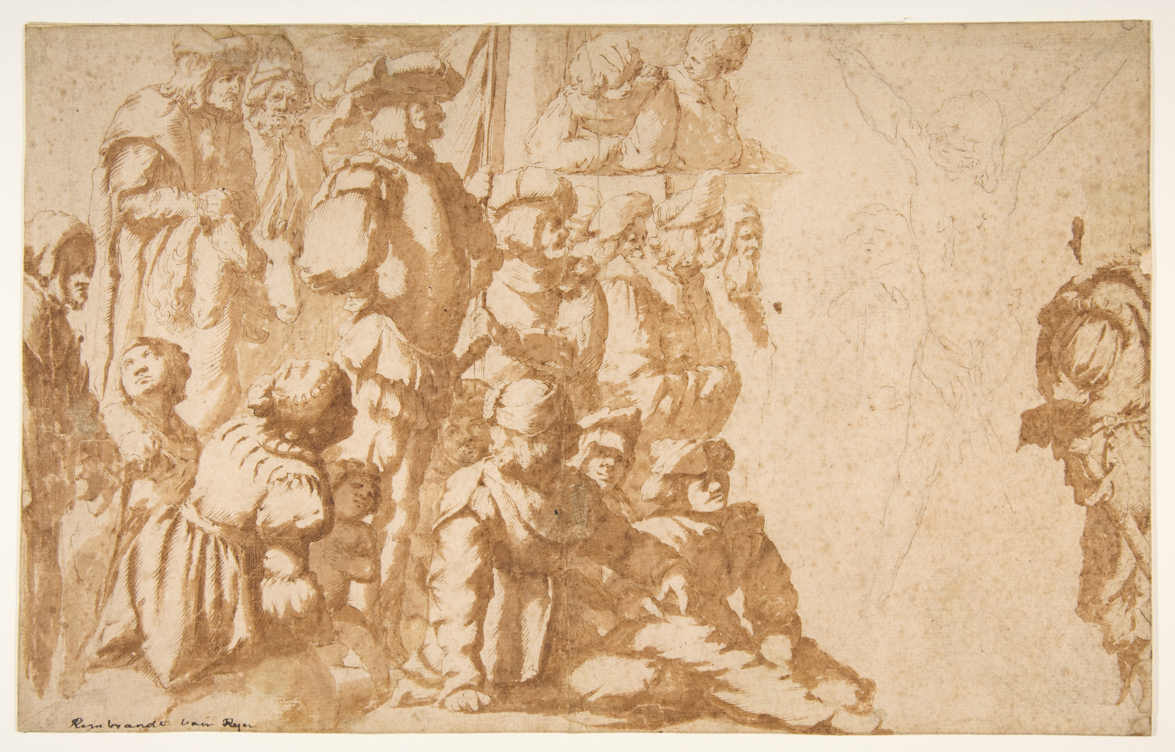 Drawing; Drawings